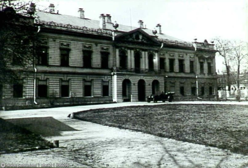 Усадьба Вяземских-Долгоруковых в Знаменском переулке